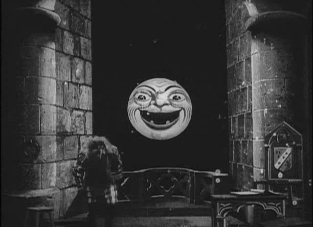 Méliès, La lune à un mètre (Star Film 160-162, 1898) 03